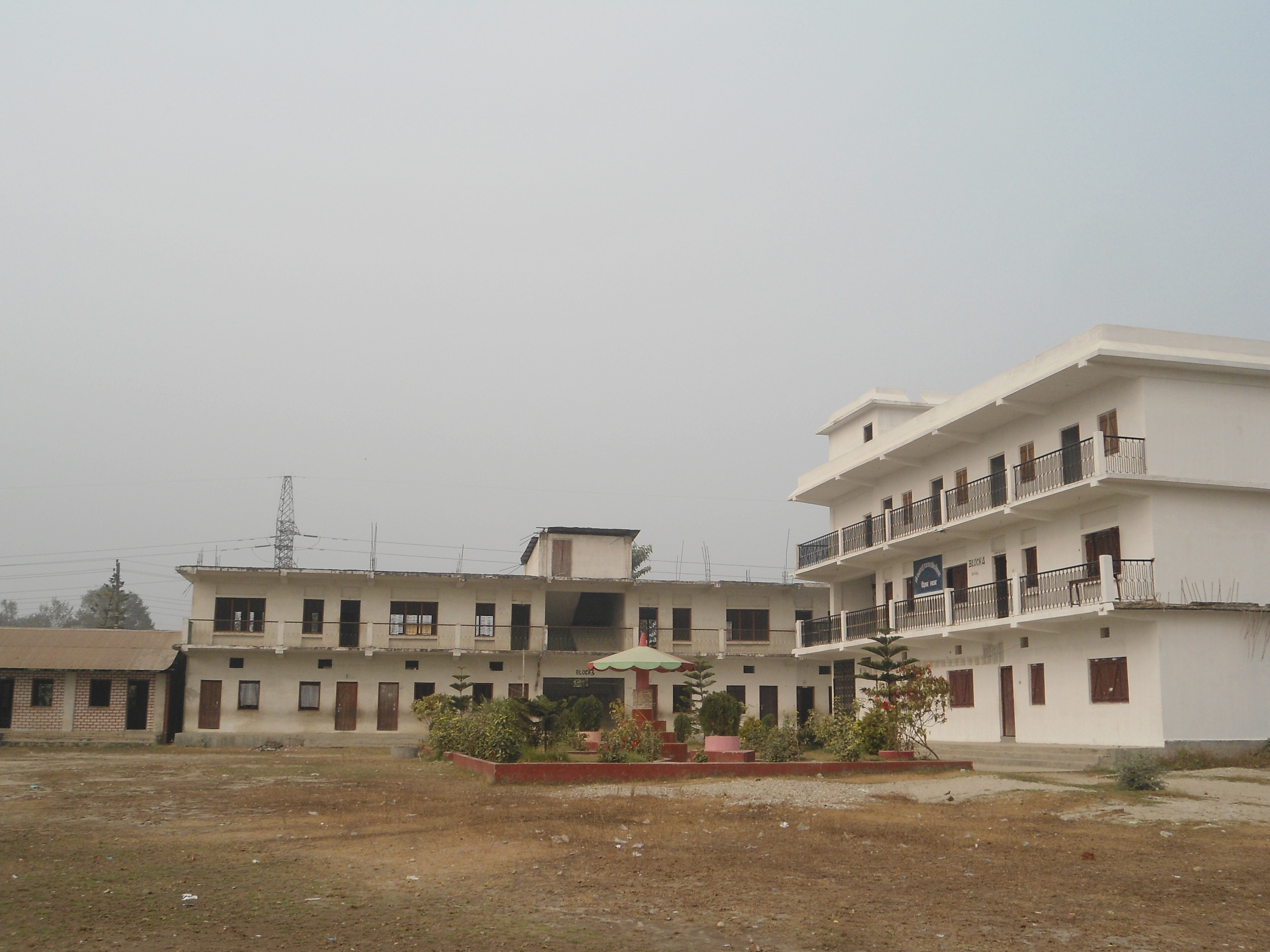 नेपाली: कन्काई विद्यालय सुरुंगा झापा नेपाल